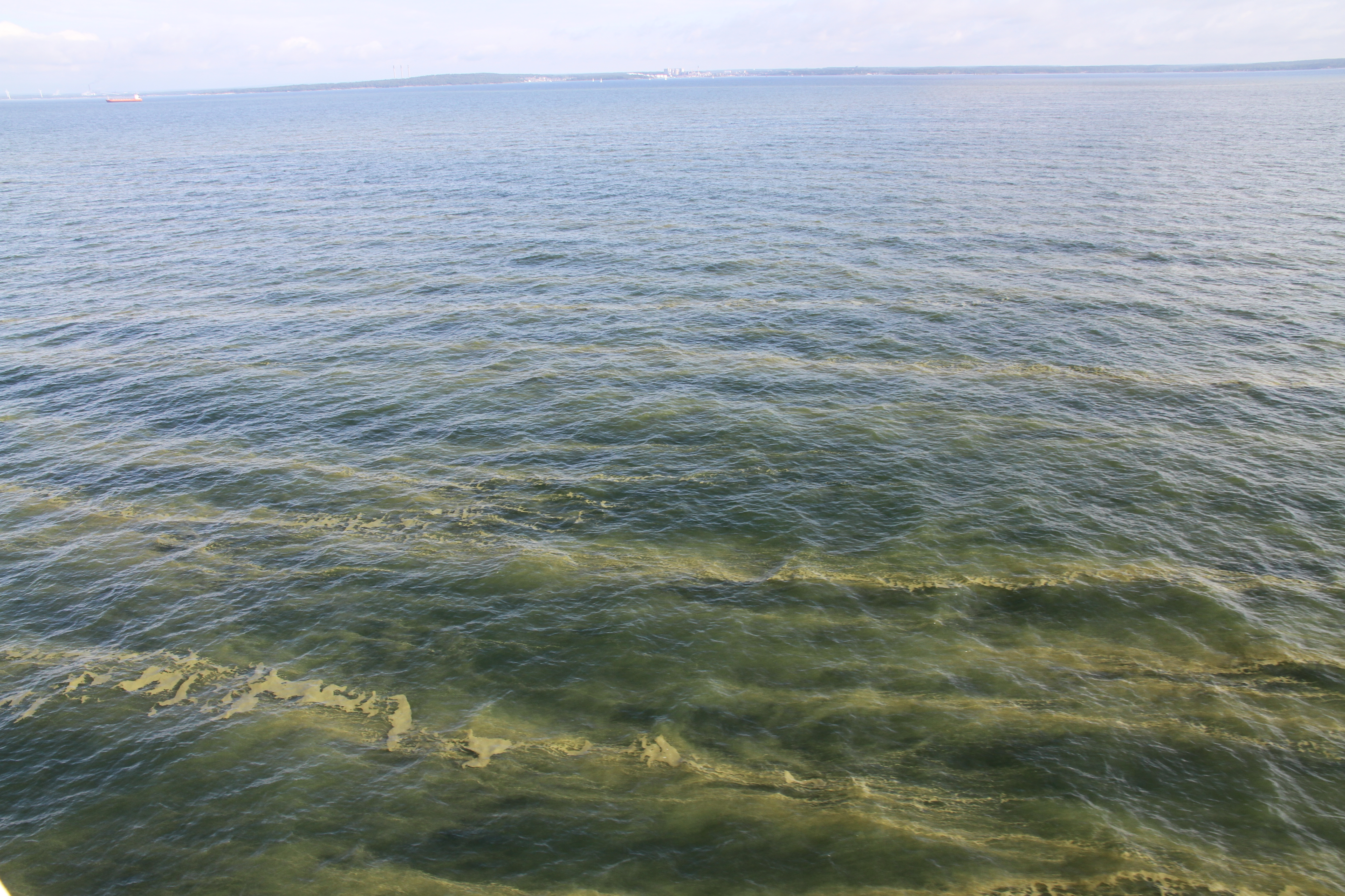 Algblomning utanför Karlshamn 15 juli 2014.